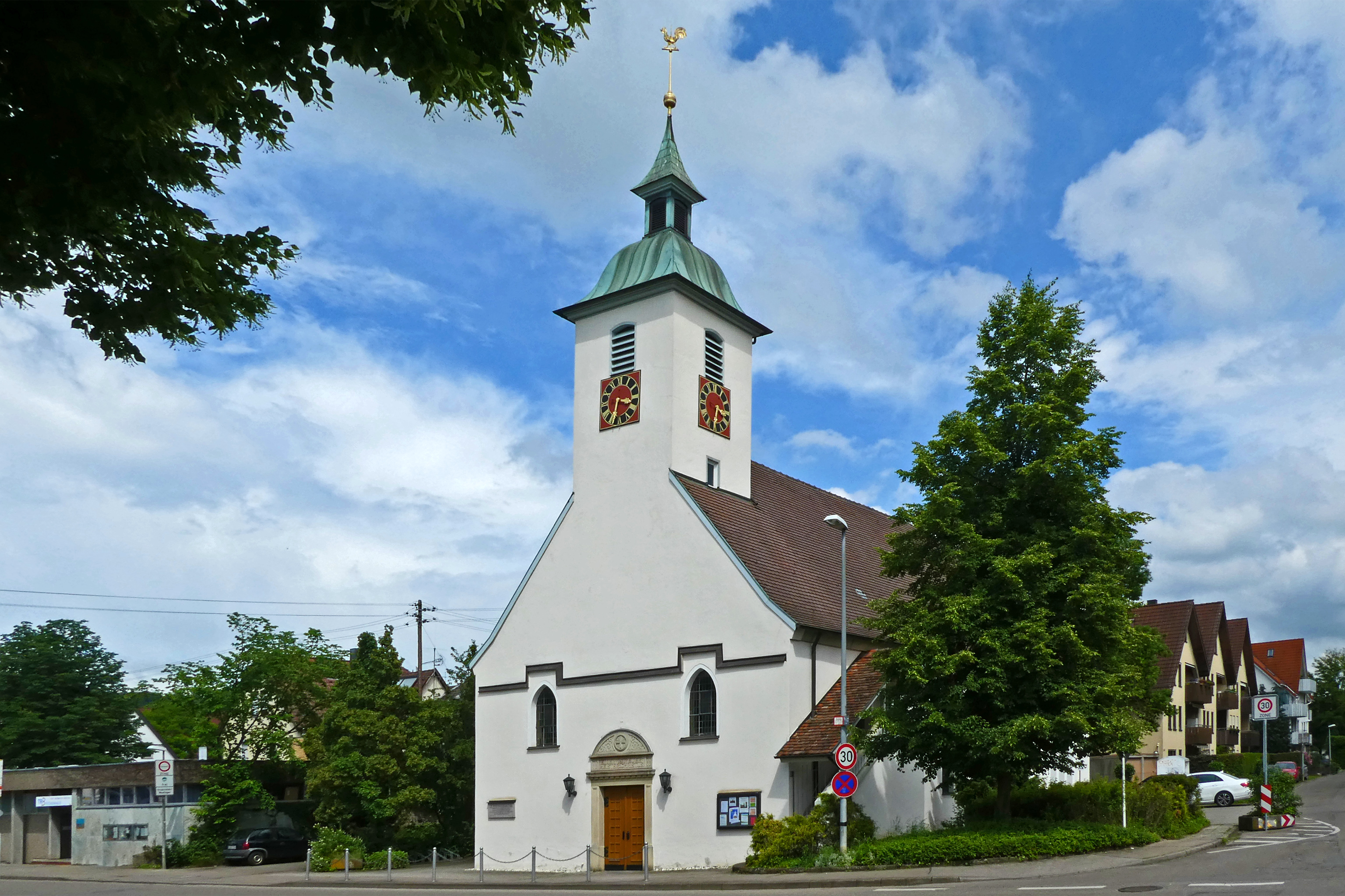 Evangelische Johanneskirche Ötlingen